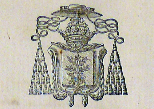 Blason de l'archevêque d'Arles Jean-Marie du Lau (sur le document référencé GG117 des archives municipales d'Arles)